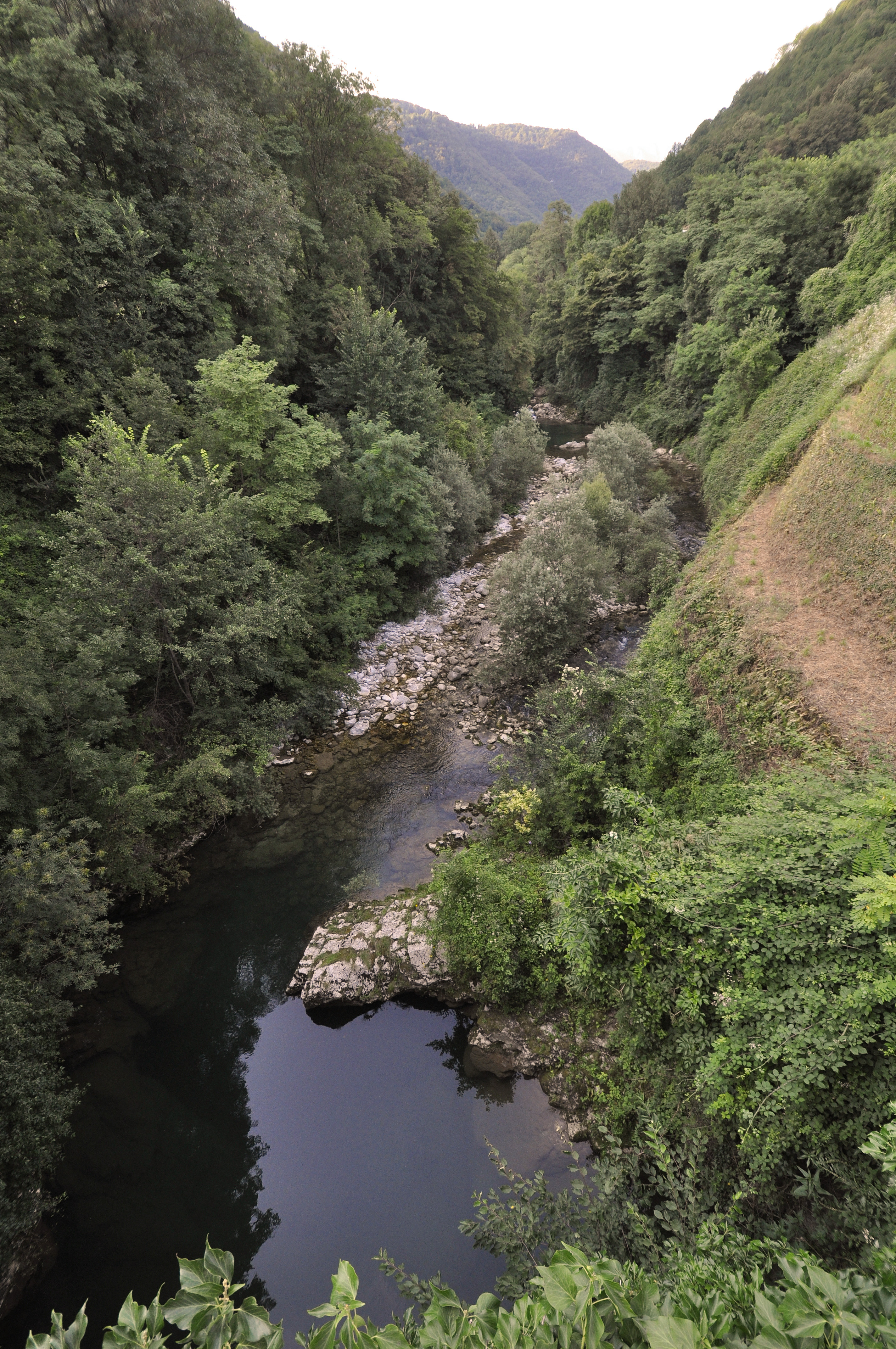 Il fiume Cornappo a Torlano (vista Ponte degli Angeli) 2011